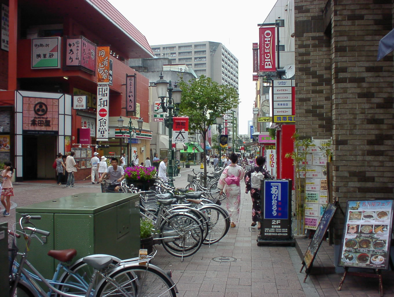 浜松商店街